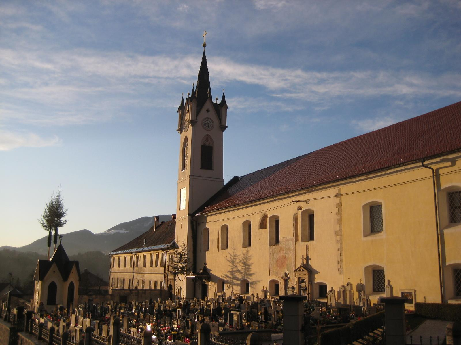 Mekinje monastery near Kamnik, Slovenia